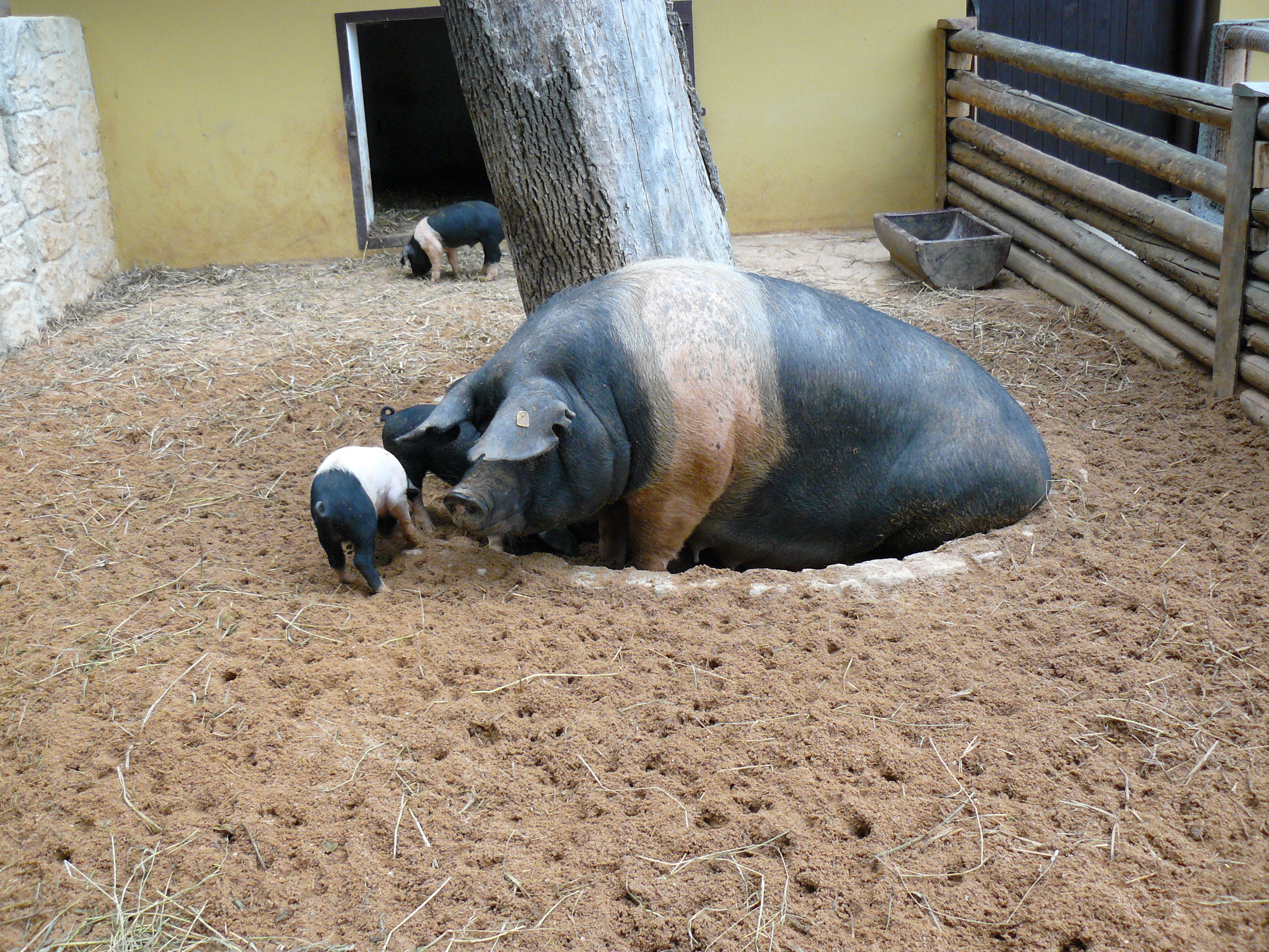 Přeštické černostrakaté prase, ZOO Plzeň